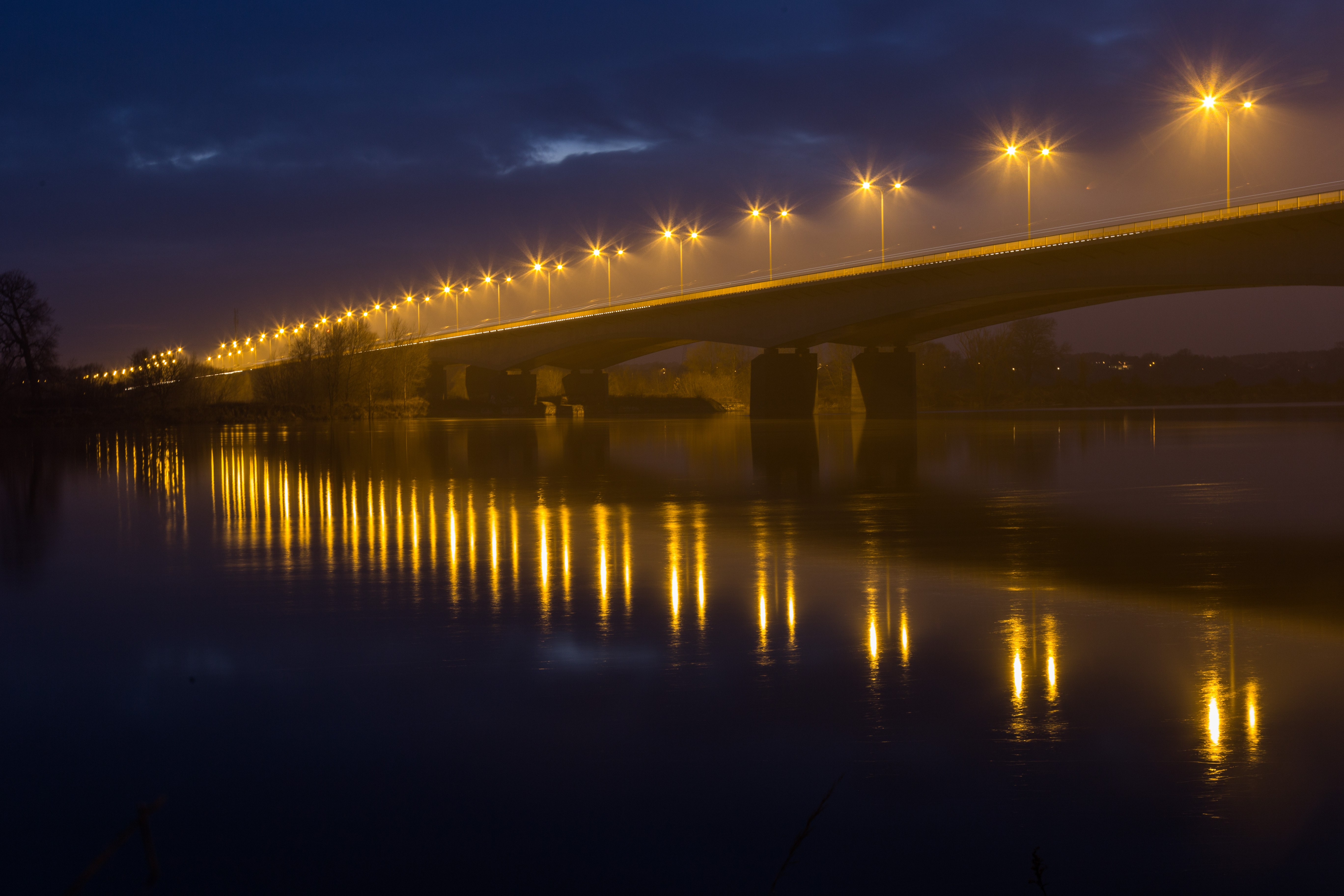 Most im. Armii Krajowej w Toruniu w ciągu autostrady A1.